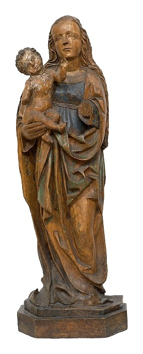 Madona ze Špalíčku II (1520), Cheb